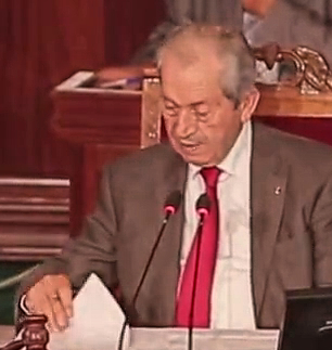 Les présidents de l'assemblée des représentants du peuple, Tunisie 19 novembre 2015